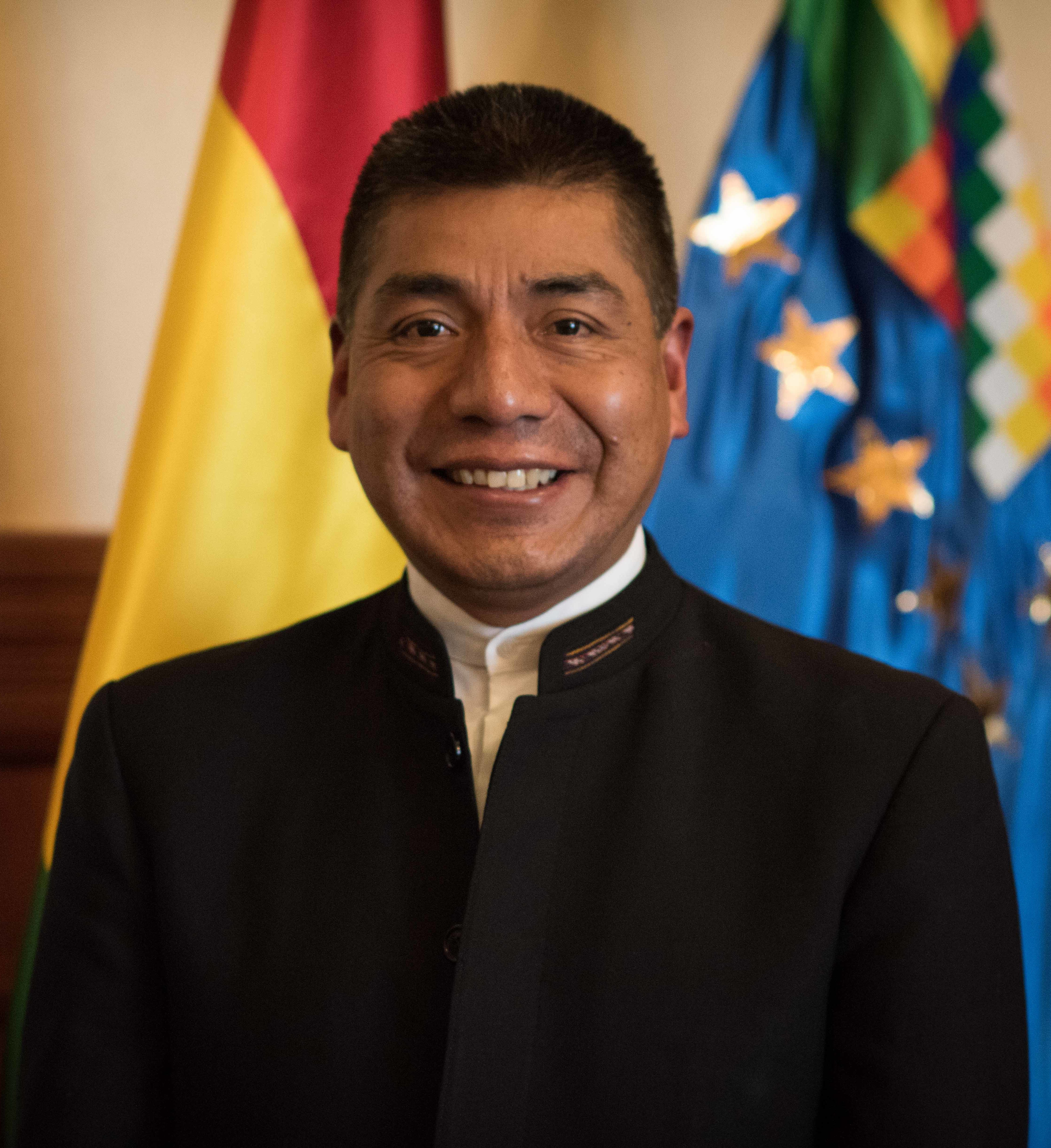 MINISTERIO DE RELACIONES EXTERIORES 2017